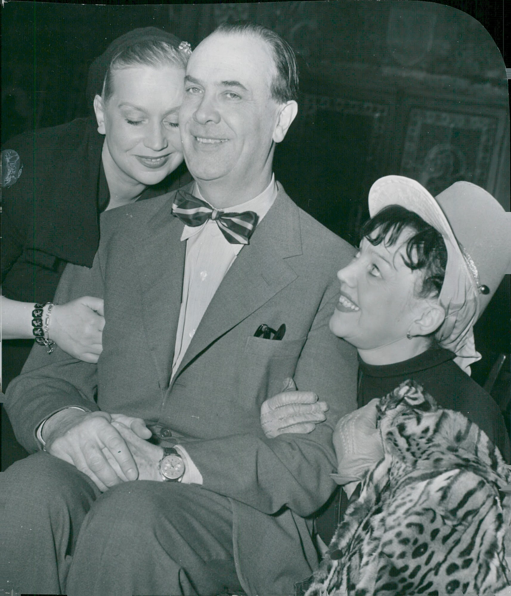 Baksidestext: "Dagen för Karl-Gerhards revypremiär på China börjar alltmer närma sig, och på måndag höll han pressmottagning på Berns. Bilden visar K.-G. flankerad av sina primadonnor Emy Hagman ( t.v. ) och Katie Rolfsen." Införd i Svenska Dagbladet 1951-03-11 sid 10 ( med bildtexten: "Mellanakt i 'Glädjehuset': Emy Hagman, Karl Gerhard och Katie Rolfsen."